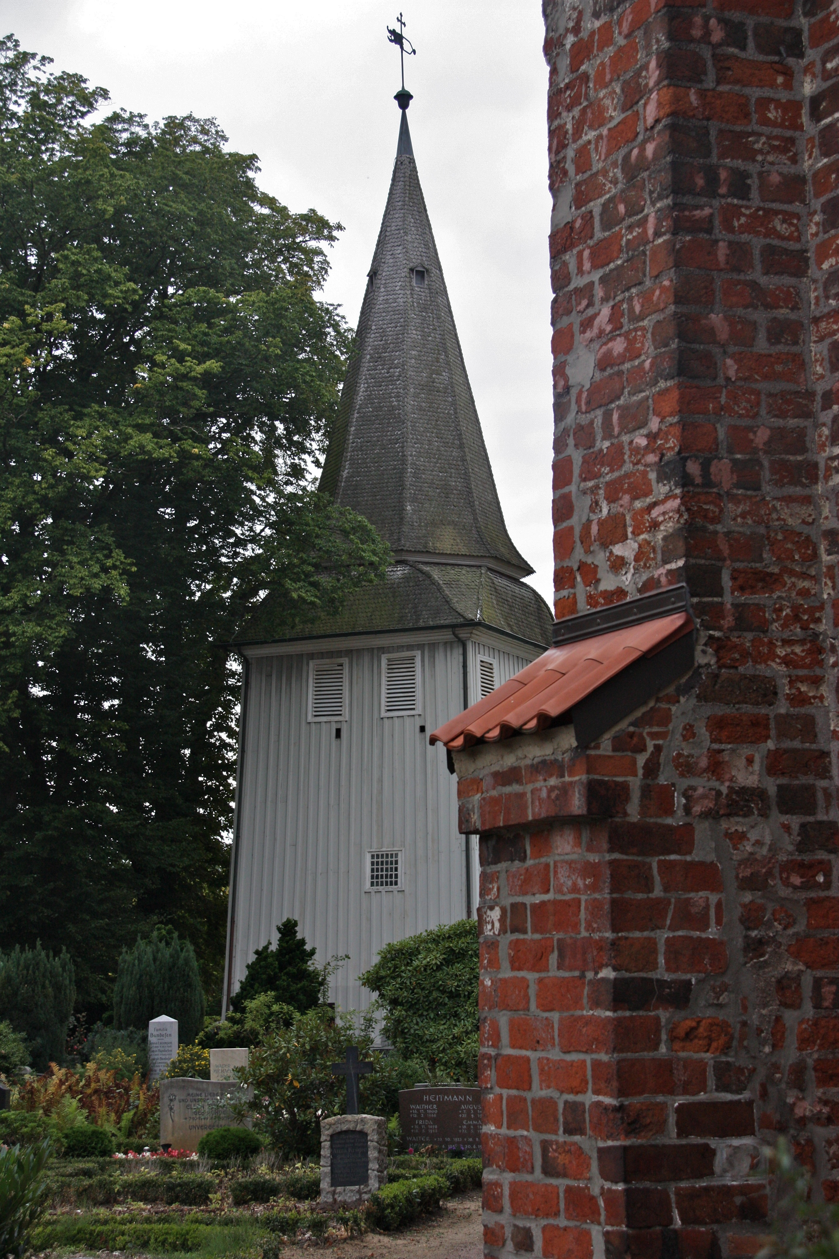 Sankt Johannis, Hamburg-Neuengamme, Turm neben der Mauer des KirchenschiffsThis is a photograph of an architectural monument.